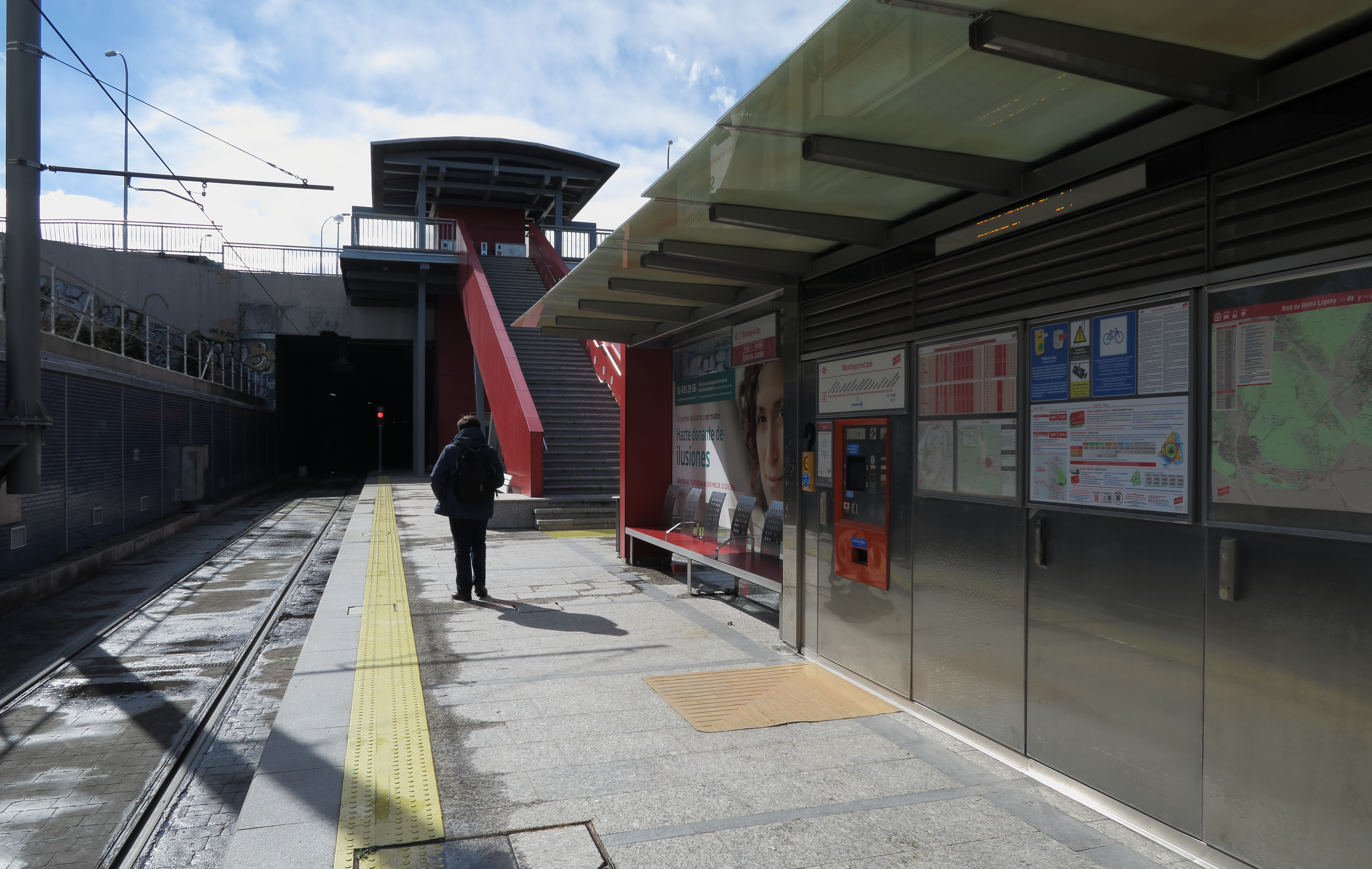 Estación de Montepríncipe